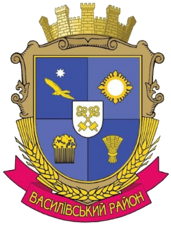 Герб Василівського району